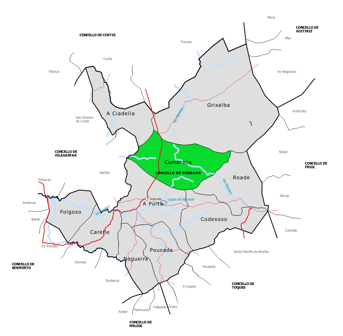 Mapa da parroquia de Cumbraos no concello de Sobrado.